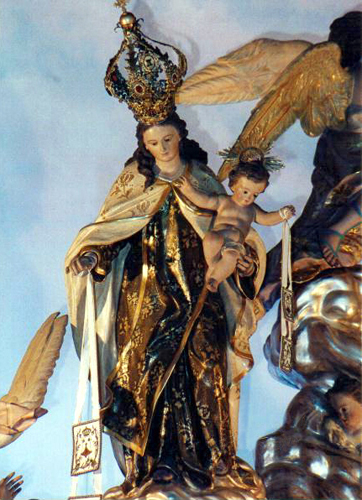 Detalle de la Virgen del Carmen, Patrona de Beniaján (Murcia), España.